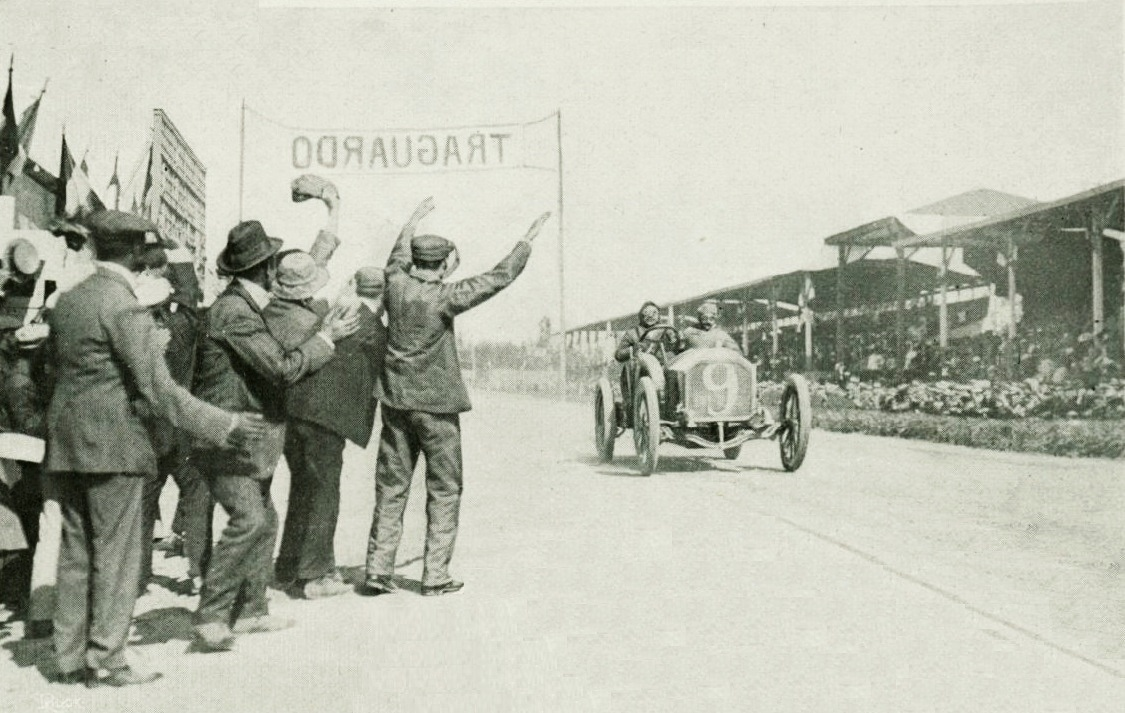 Jean Porporato, vainqueur de la Ière 'Targa Bologna' sur Berliet 40 hp en 1908 - La vie au Grand Air du 17 septembre 1908, p.201